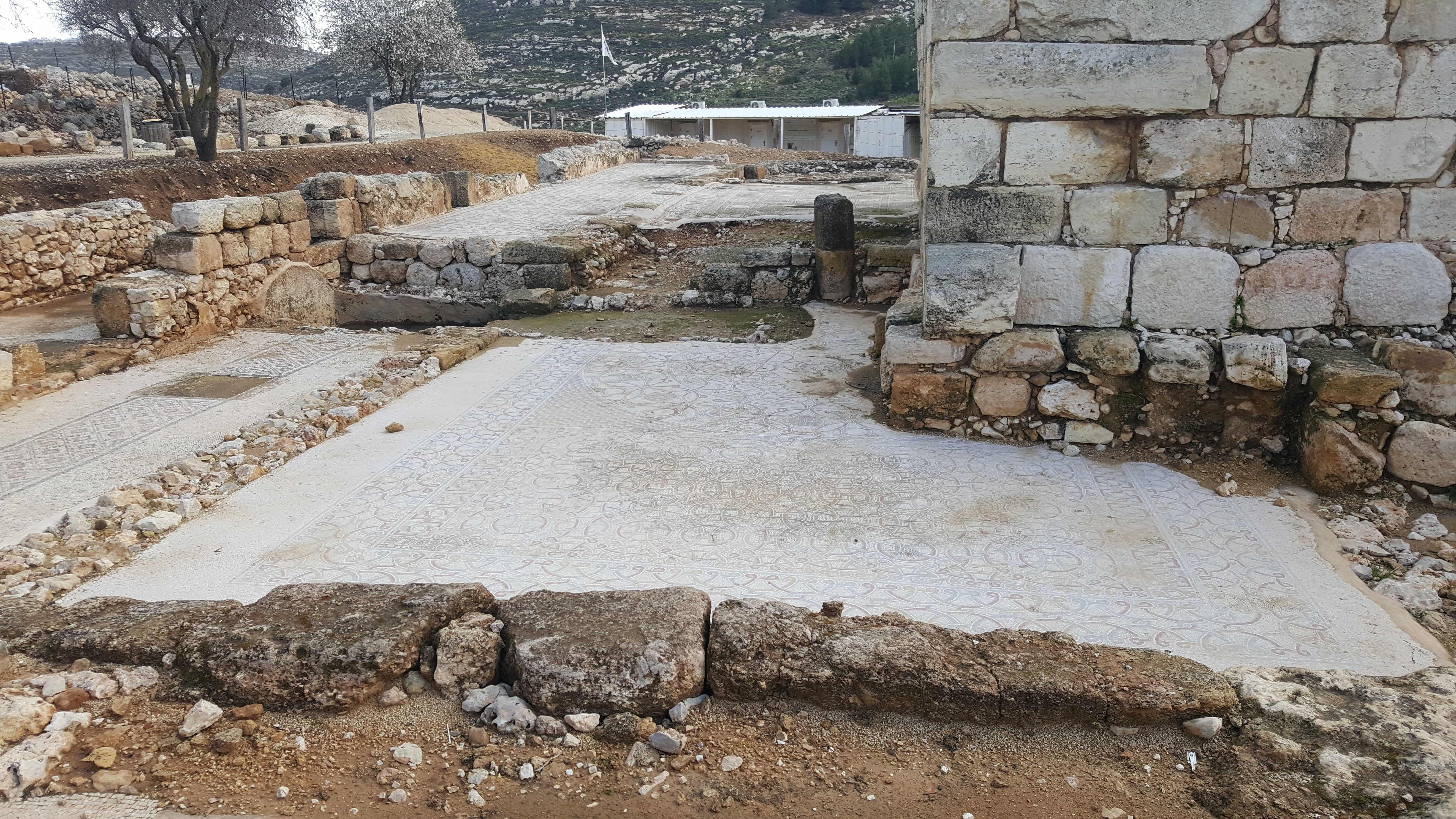 שילה העתיקה